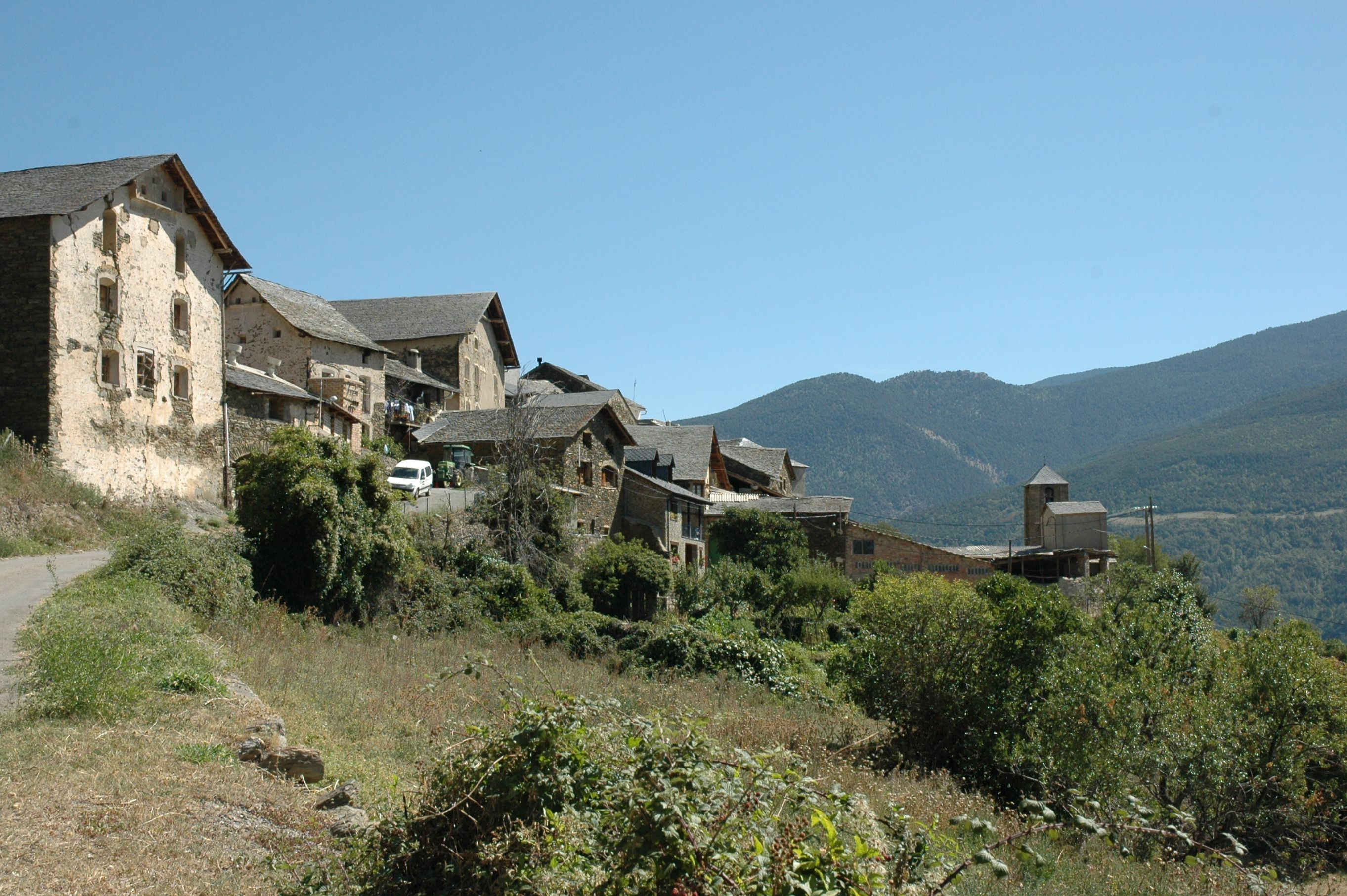 Surp